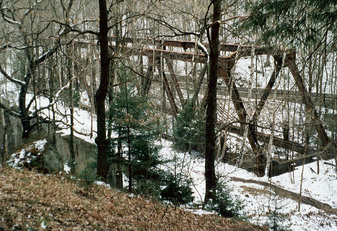 Brücken an der oberen Bahnhofsausfahrt in Langenhennersdorc